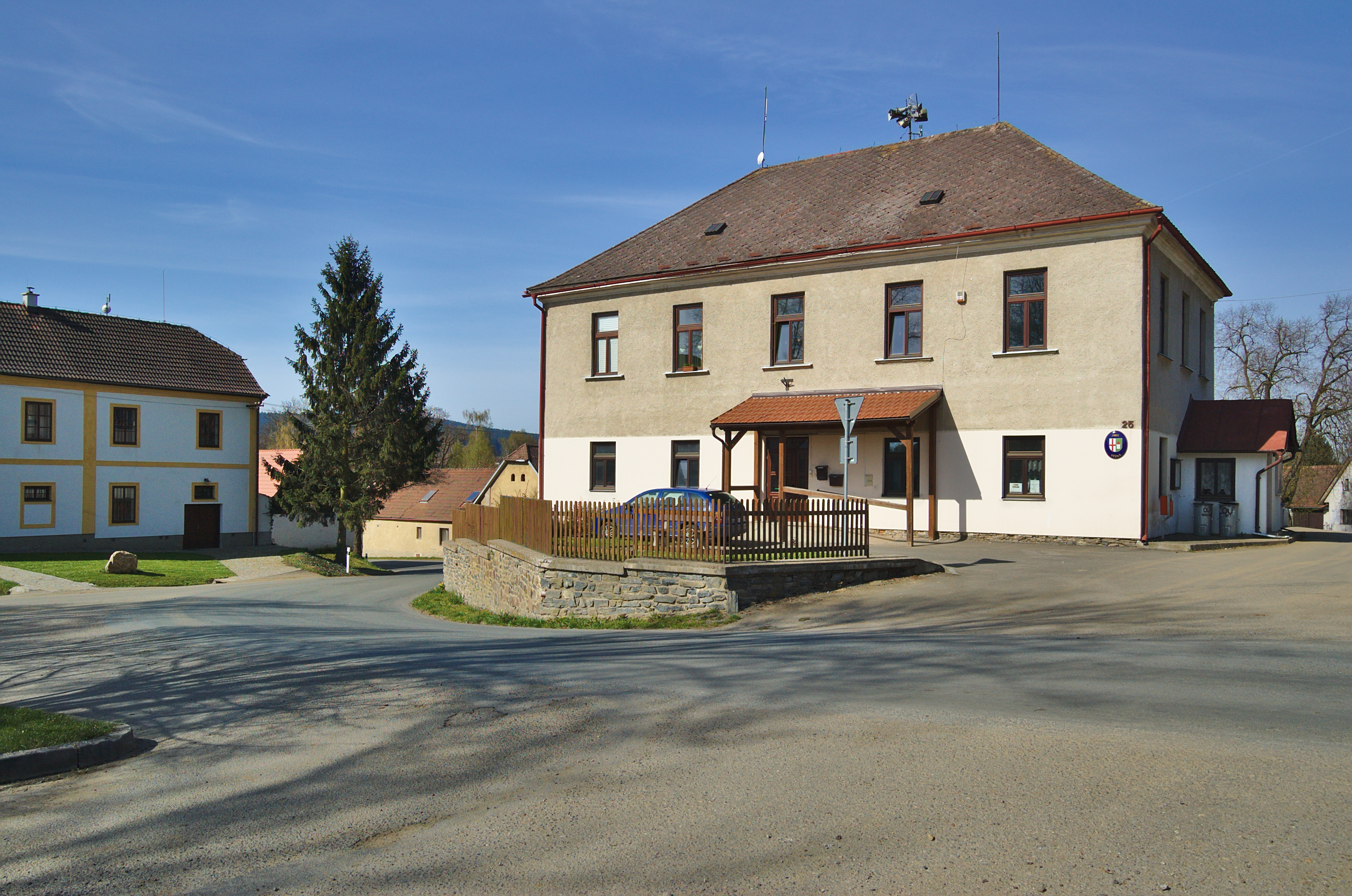 Obecní úřad, Věžná, okres Pelhřimov Project: Fotíme Česko